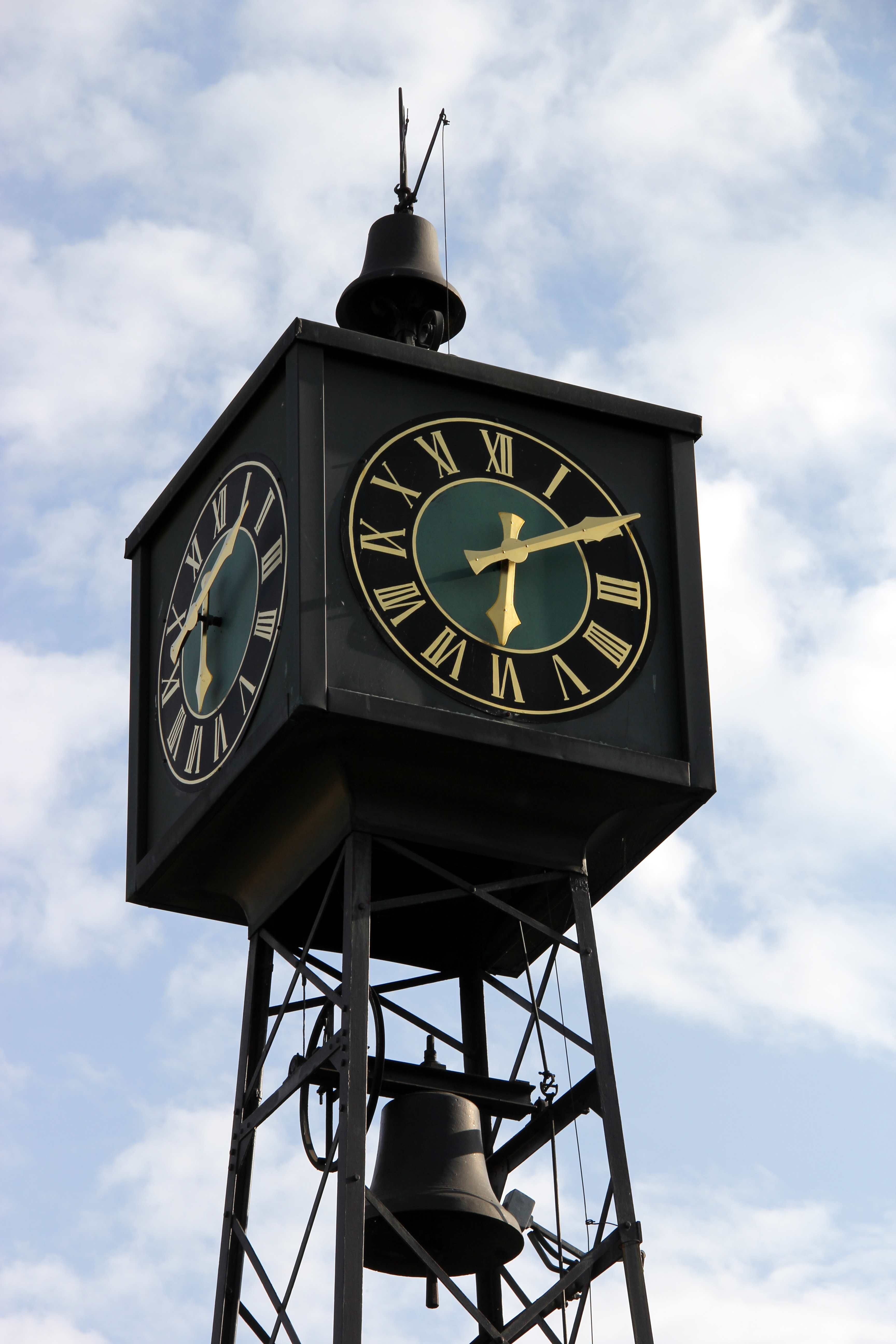 Schwarzenbach, Uhrturm